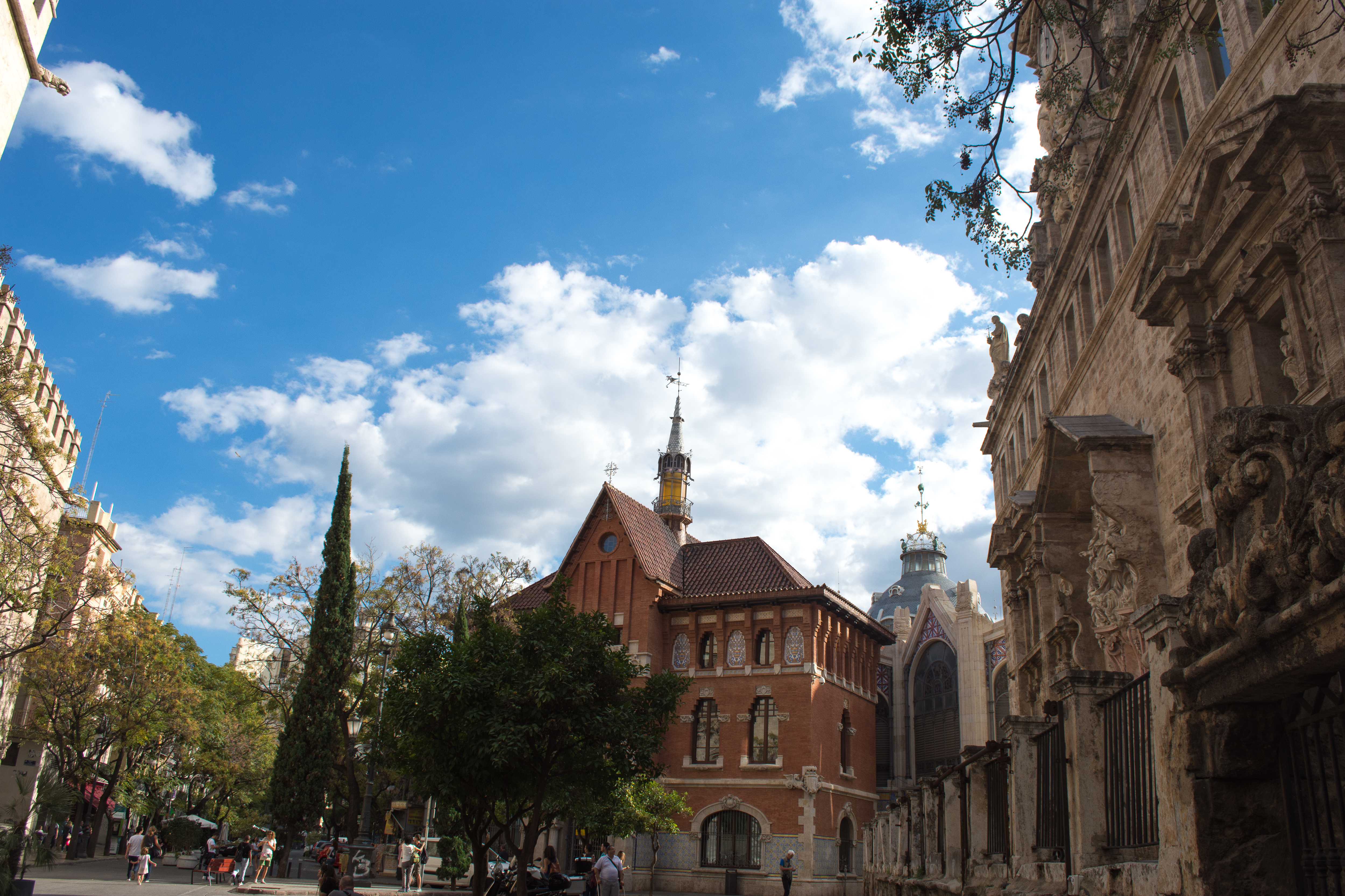 Plaza del Mercado, Valencia.